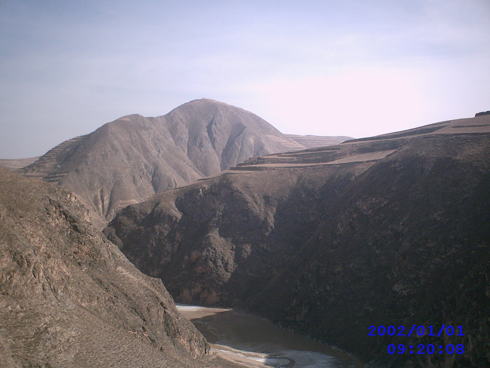 通渭县石峰堡